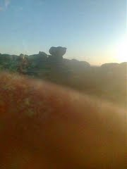 حجر المليك